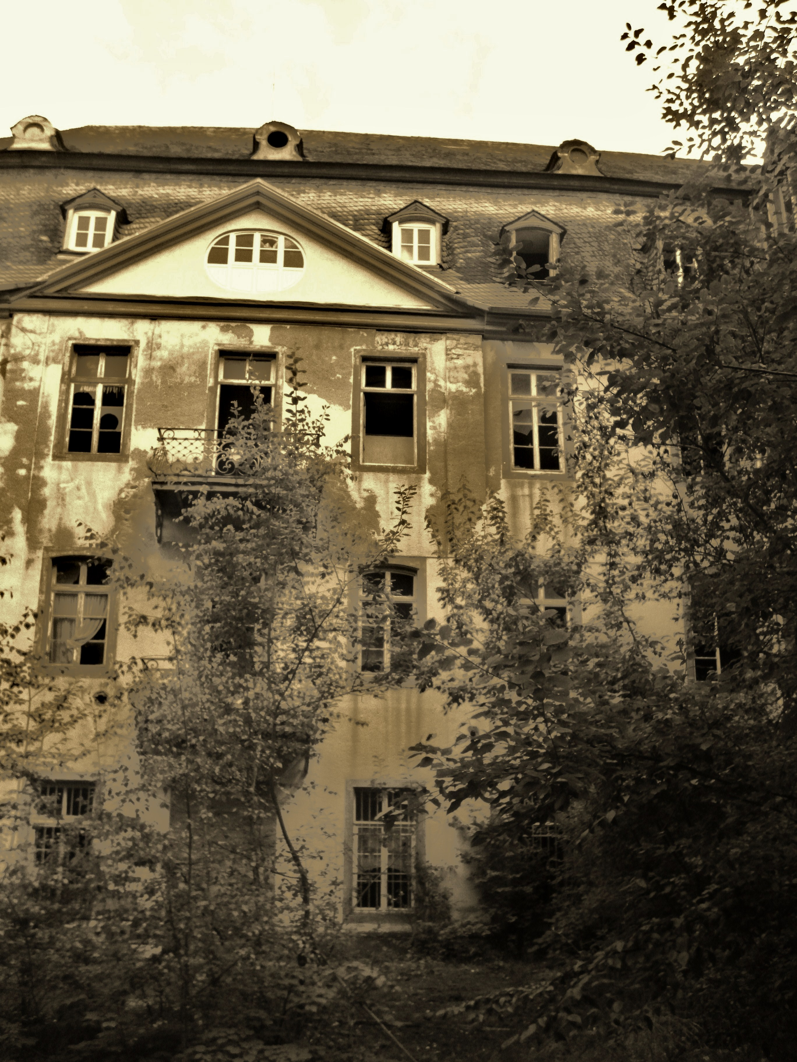 LostPlaceBoppard